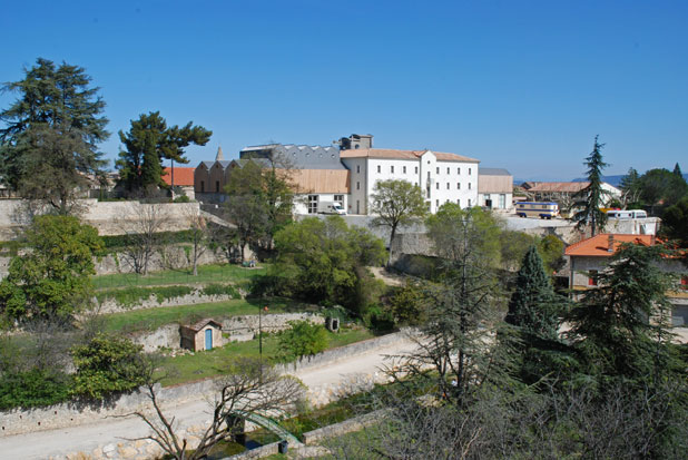 la Cascade, maison des arts du clown et du cirque à Bourg-Saint-Andéol